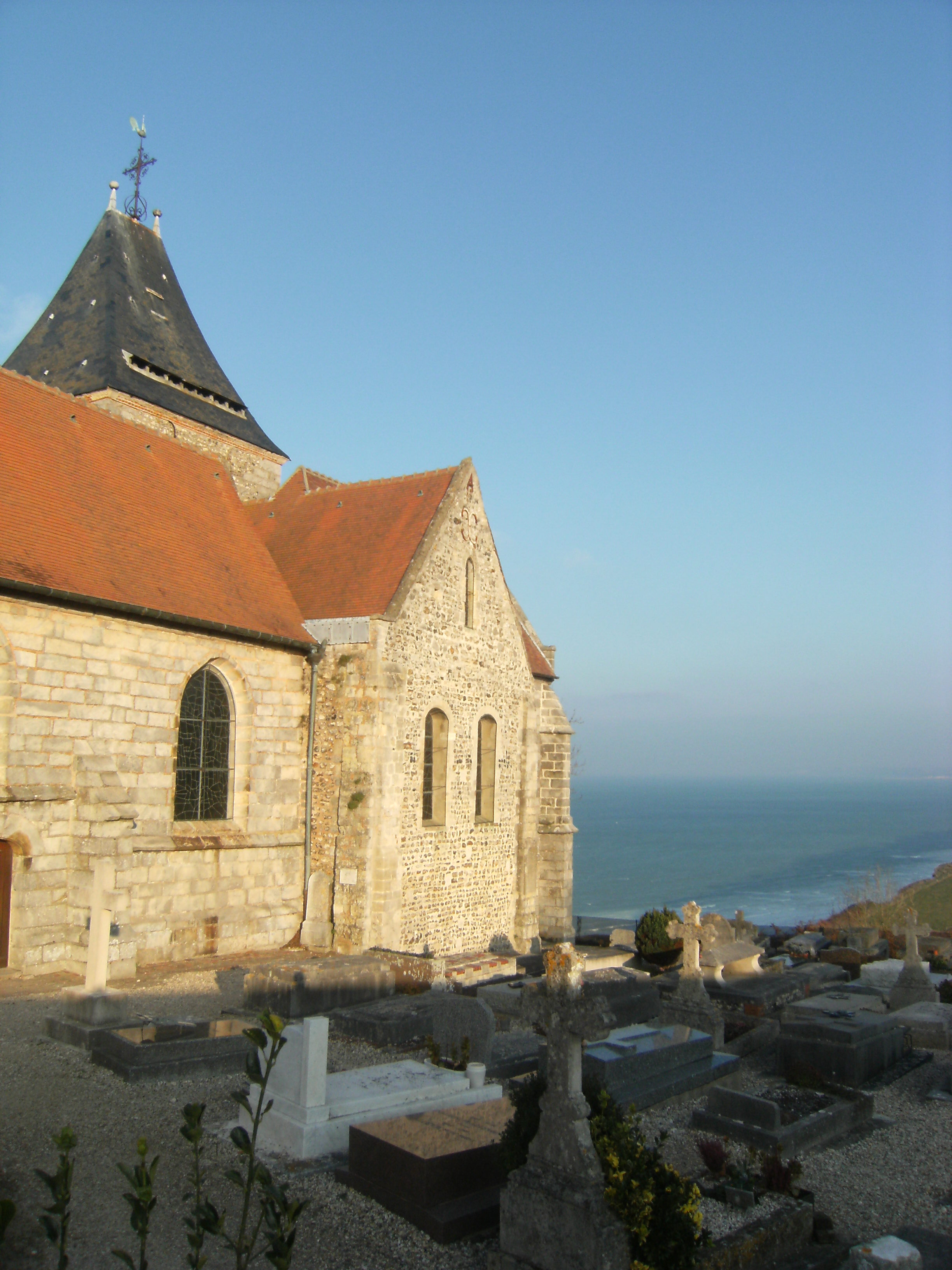 Eglise Saint Valery de Varengeville-sur-Mer